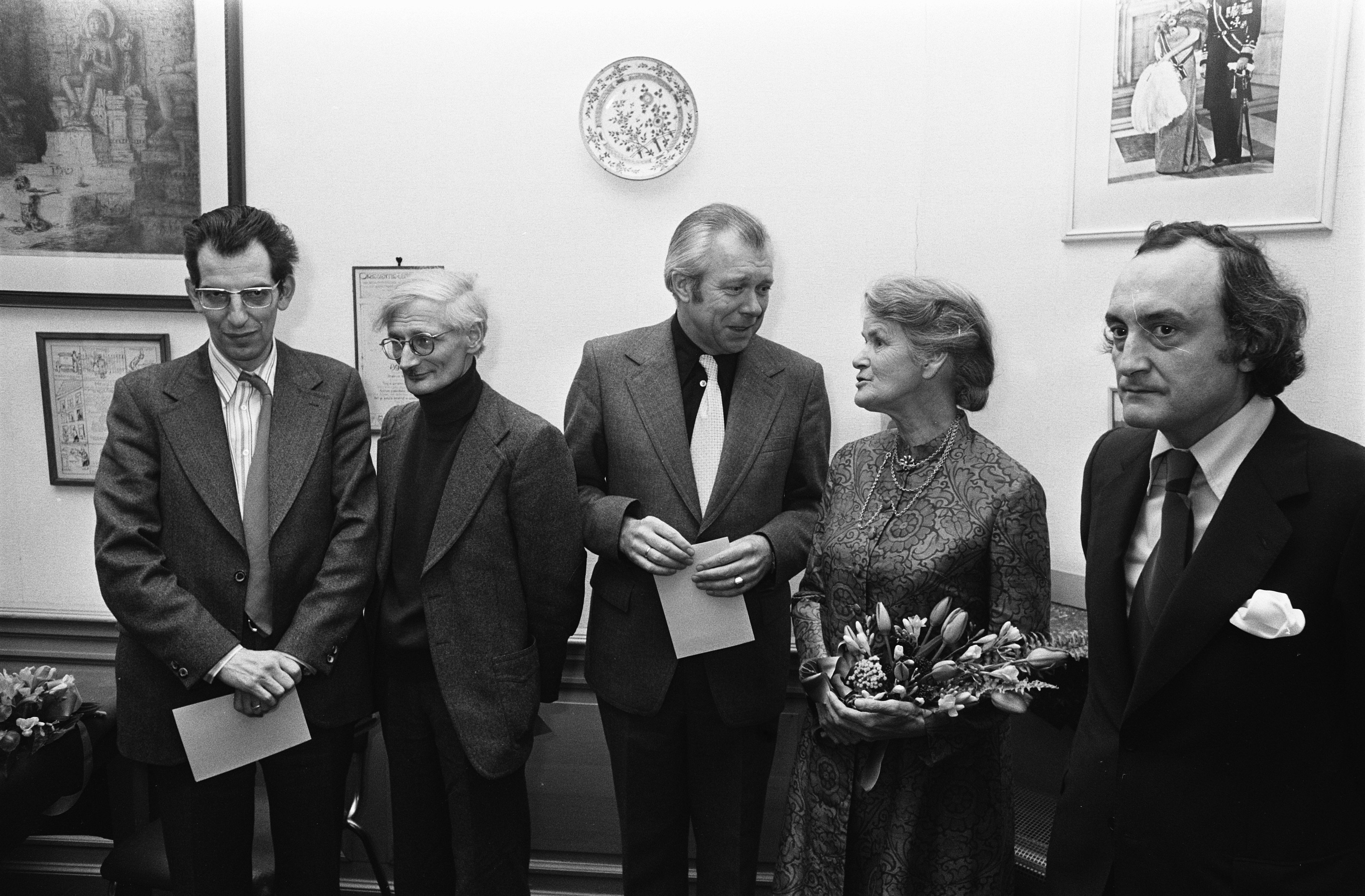 Letterkundige prijzen Jan Campert Stichting uitgereikt in Den Haag ; v.l.n.r. dr. P.J. Buijnsters, William D. Kuik (Dirkje Kuik), wethouder Piet Vink, M. Vasalis en Hughues C. Pernath. Den Haag, 19 december 1974: Jan Campertprijzen.